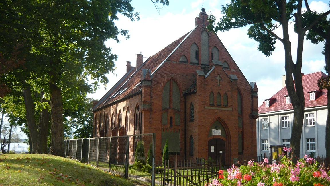 kościół chrześcijan baptystów Szczytno, ul. Sienkiewicza 3, Szczytno (gmina miejska)